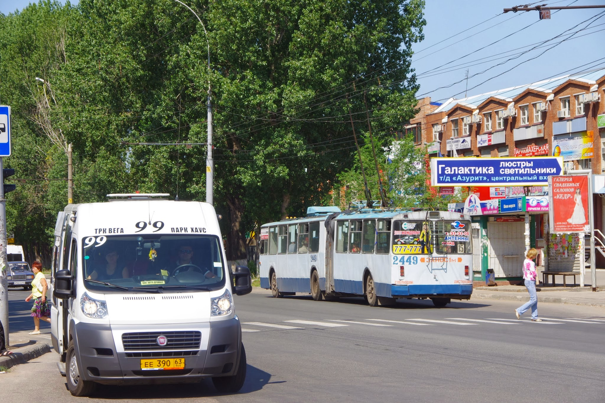 Avtozavodskiy rayon, Tolyatti, Samarskaya oblast', Russia